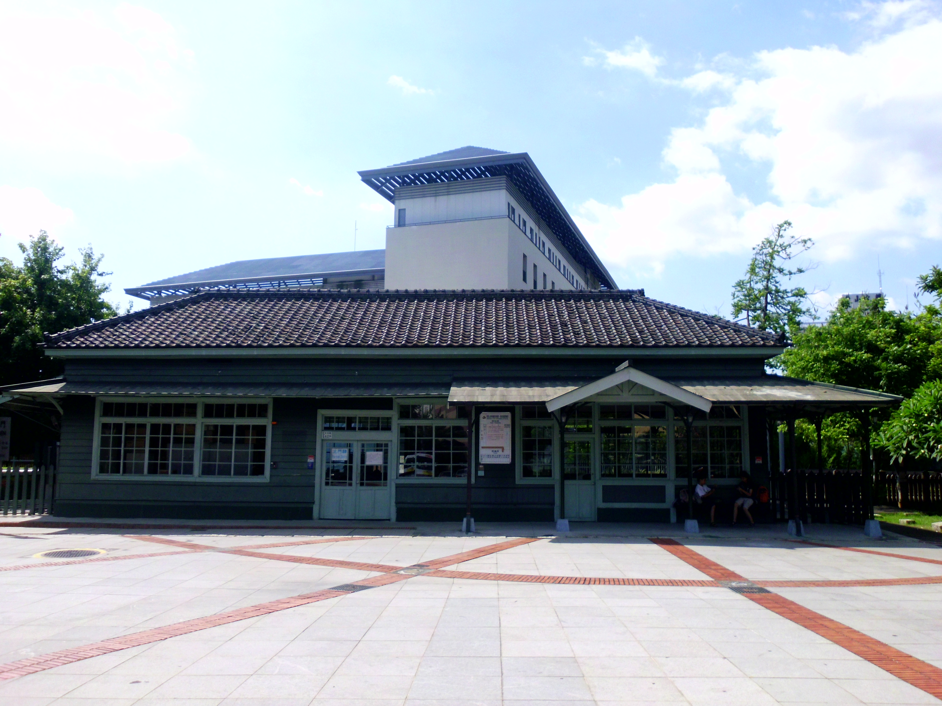 原阿里山森林鐵路嘉義北門站站舍。